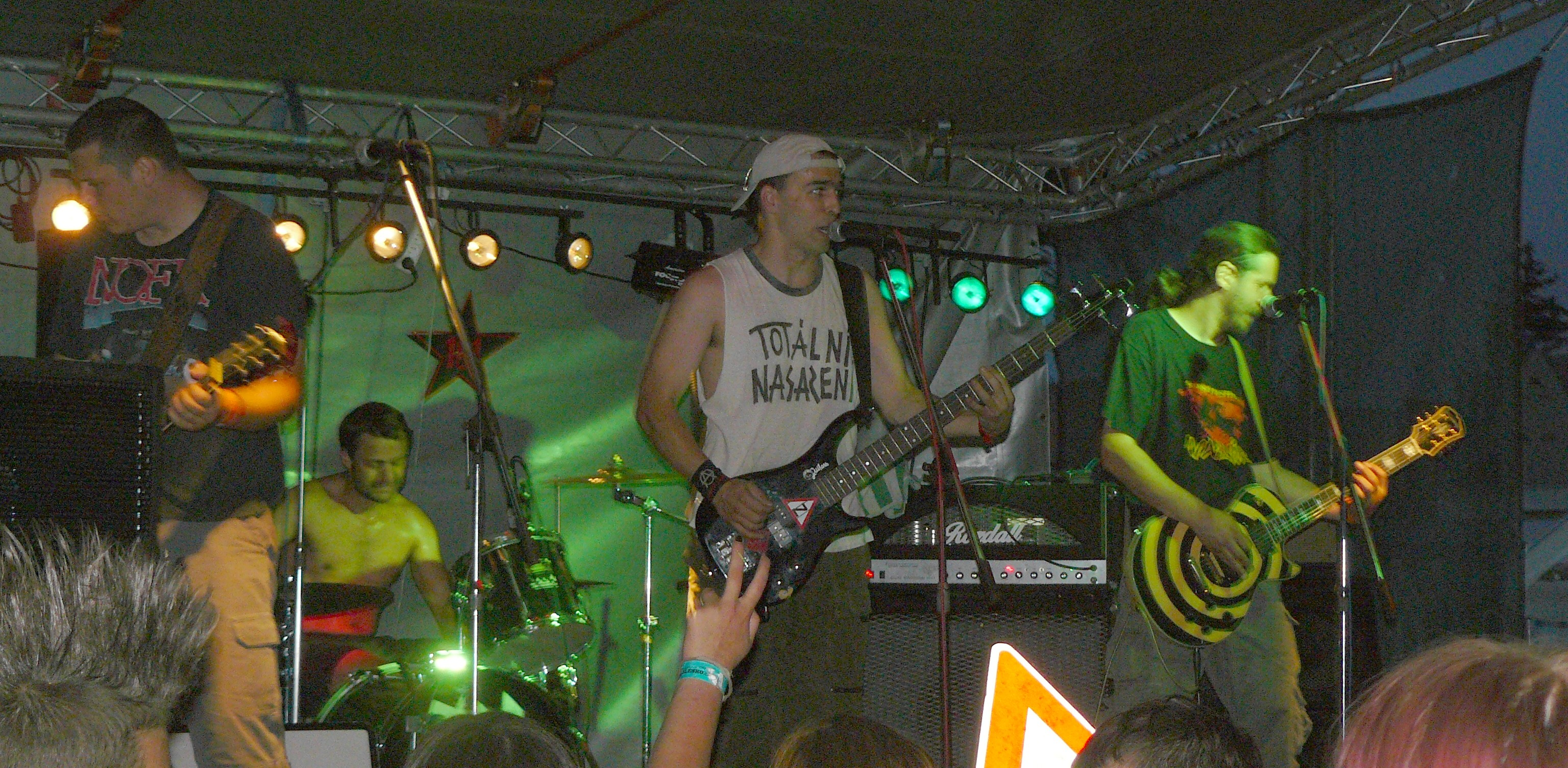 Česká punková kapela Totální nasazení